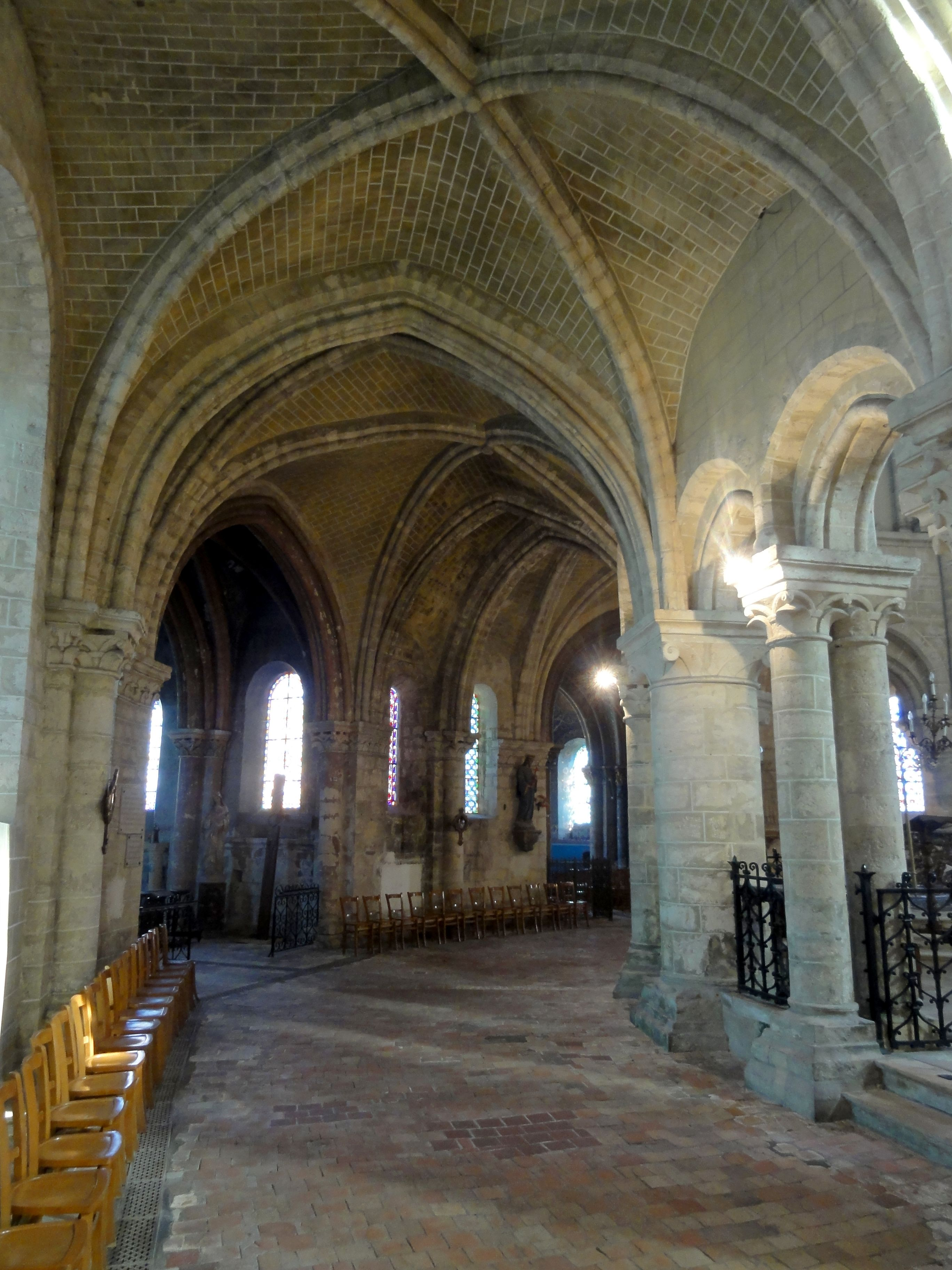 Déambulatoire nord, vue vers l'est.